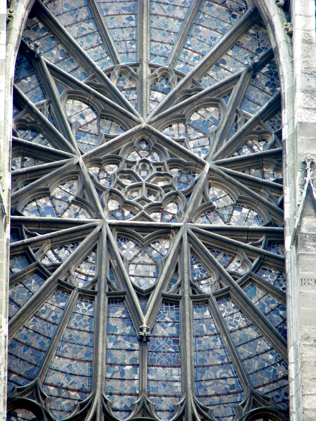 Rose du transept Nord de la cathédrale d'Amiens, figurant un pentagramme.